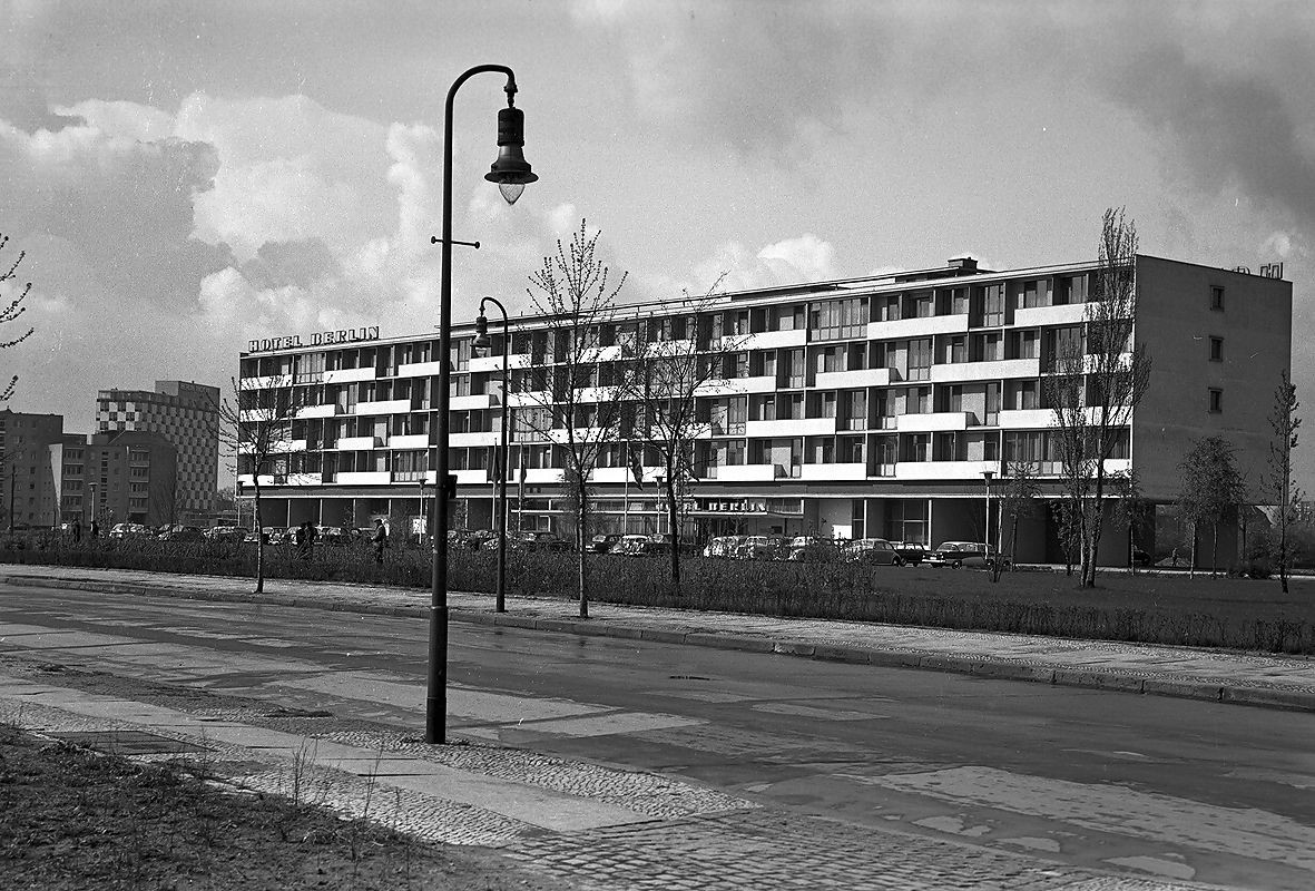 Das Hotel Berlin (heute Hotel Berlin, Berlin am Lützowplatz in Berlin